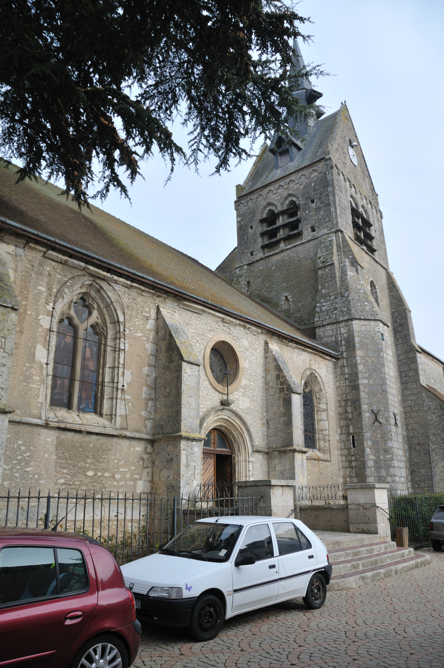 Église Saint-Pierre-et-Saint-Eutrope d'Angerville, Essonne, France